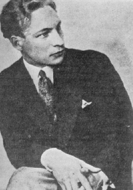 Walter Seidl (1905-1937), slezský, německy píšící spisovatel, novinář a kritik